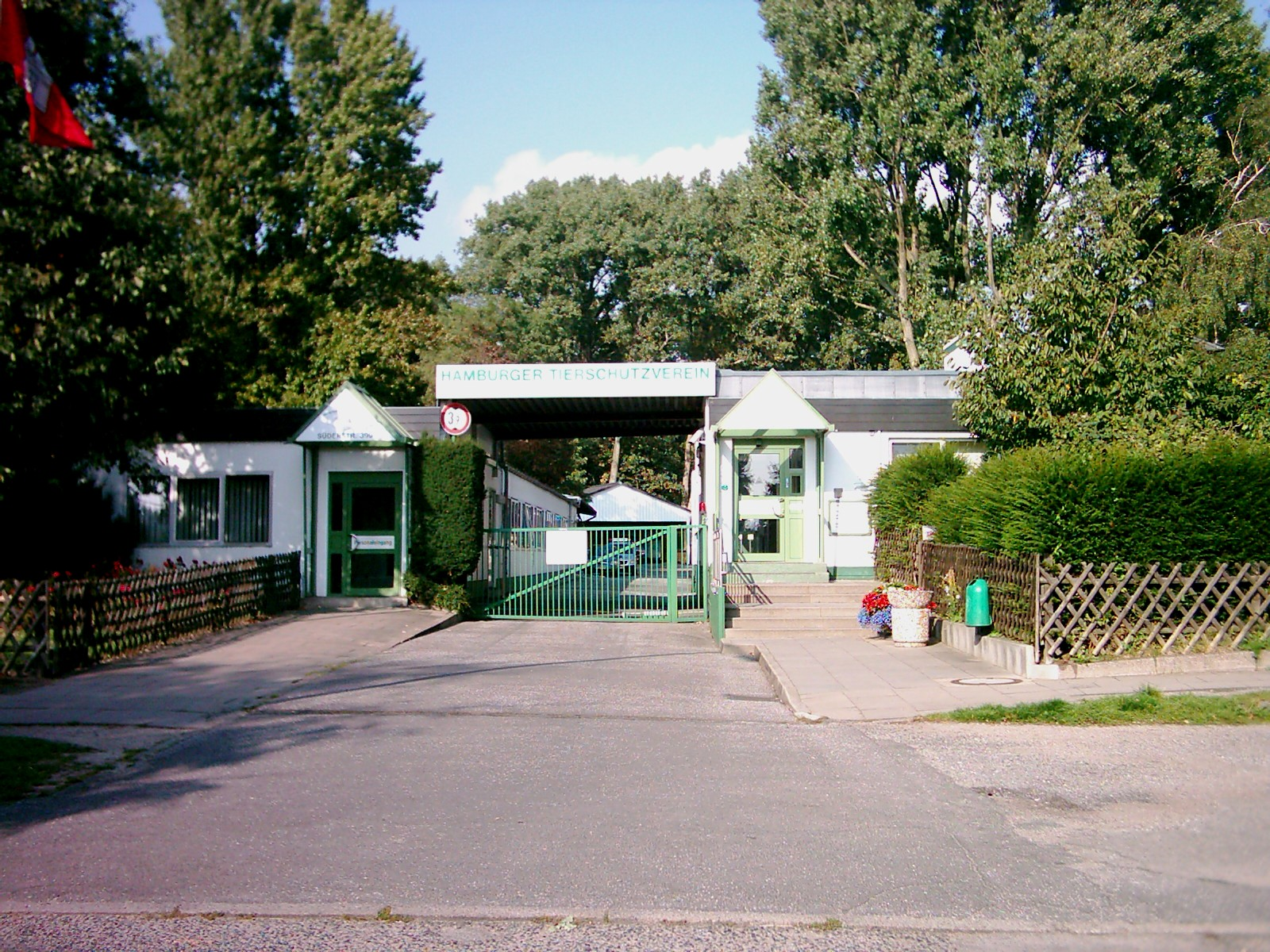 Das Tierheim Süderstraße des Hamburger Tierschutzvereins, Hamburg-Hamm. Siehe auch Image:Tierheim Süderstraße 02.jpg.